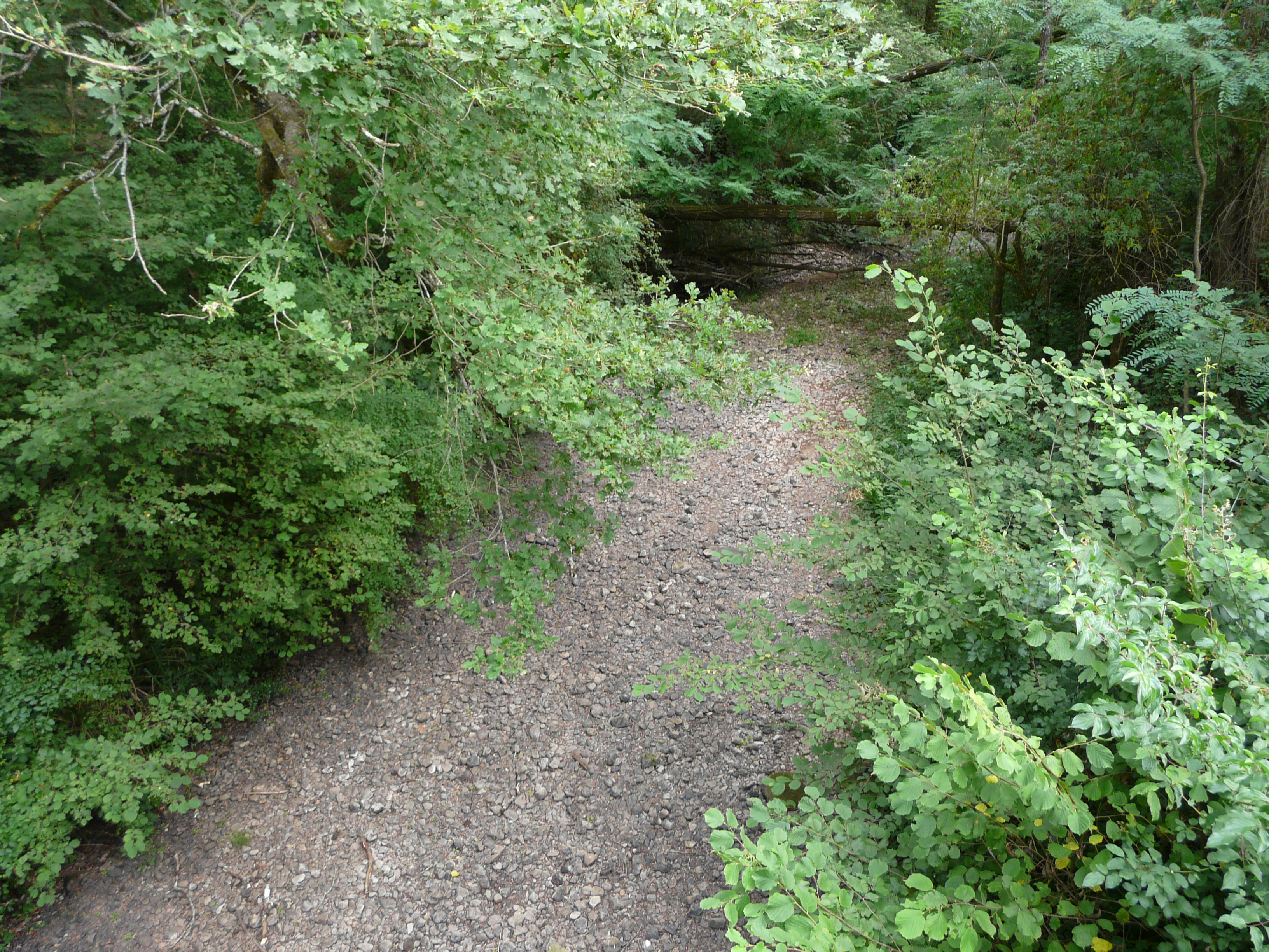 La Logne en aval de la route départementale 3, Brignac-la-Plaine, Corrèze, France.